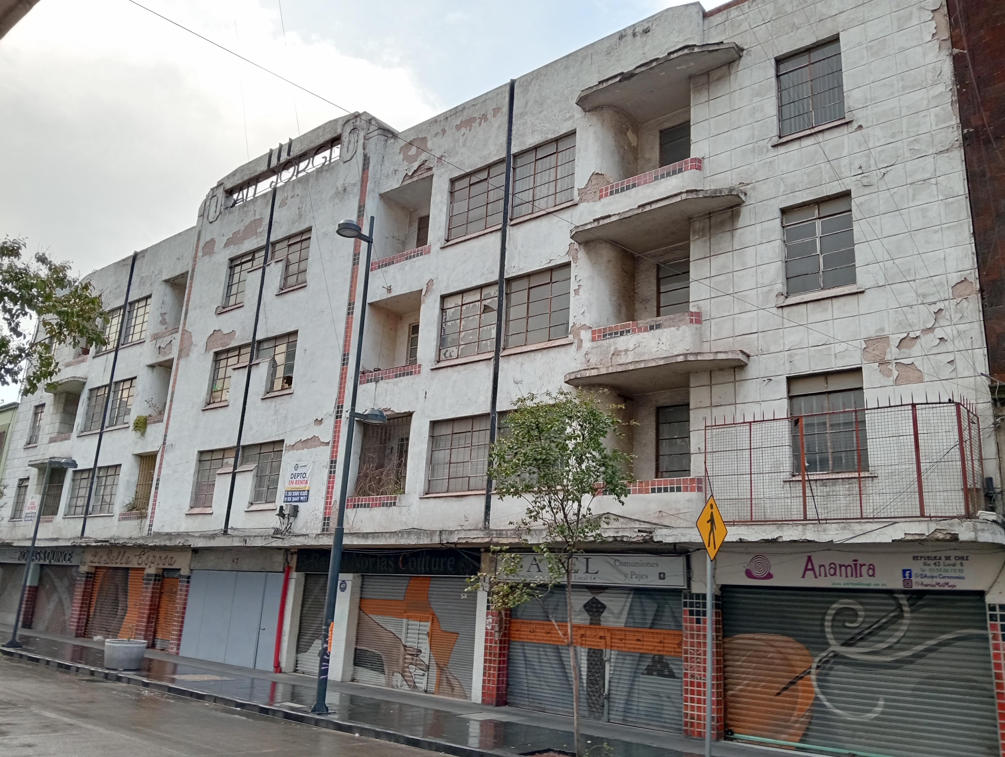 Edificio San Jorge en la calle República de Chile 43 en el centro histórico de la ciudad de México